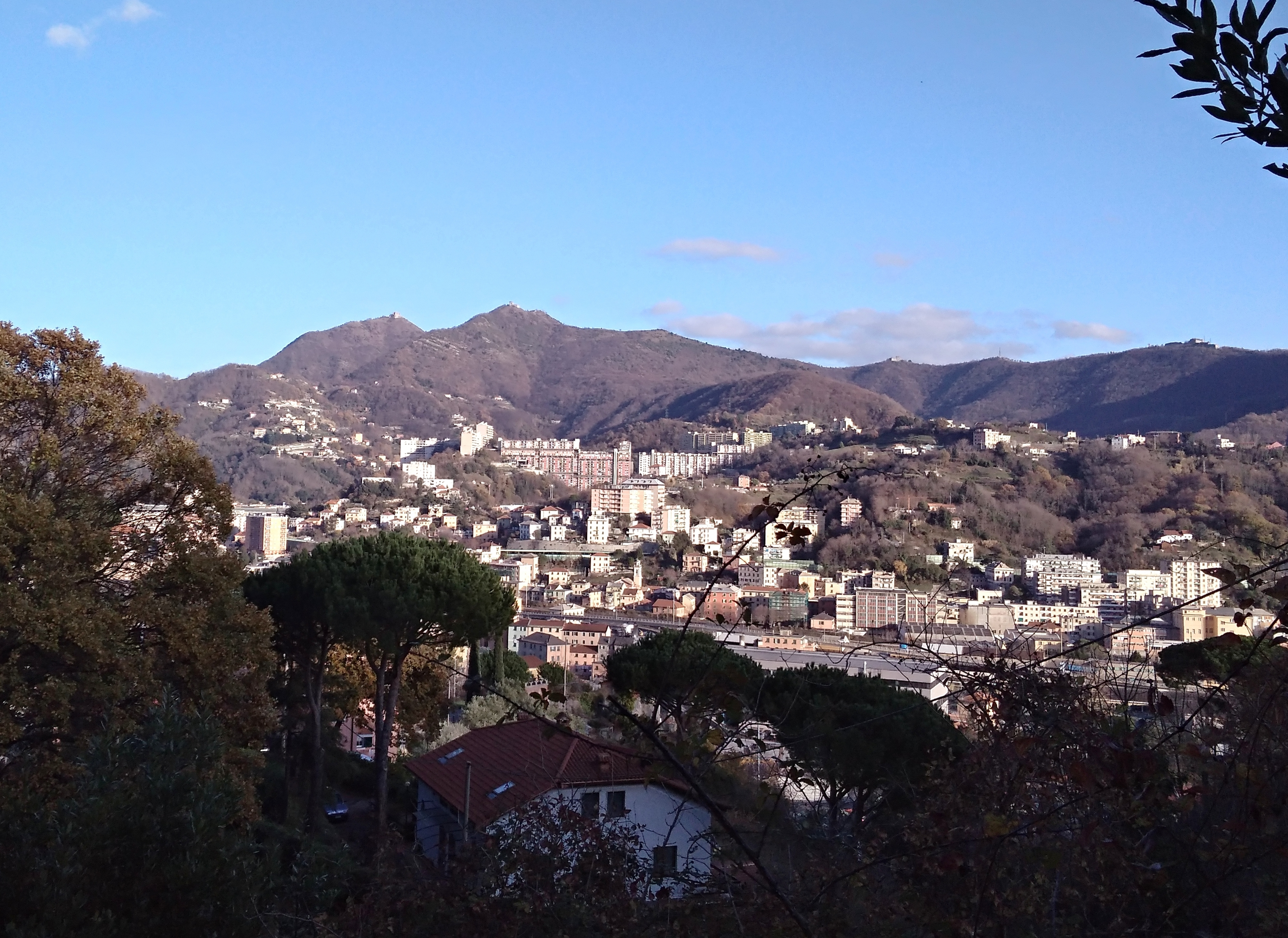 Panorama della val Polcevera verso il quartiere di Teglia con il monte dei Due Fratelli sullo sfondo